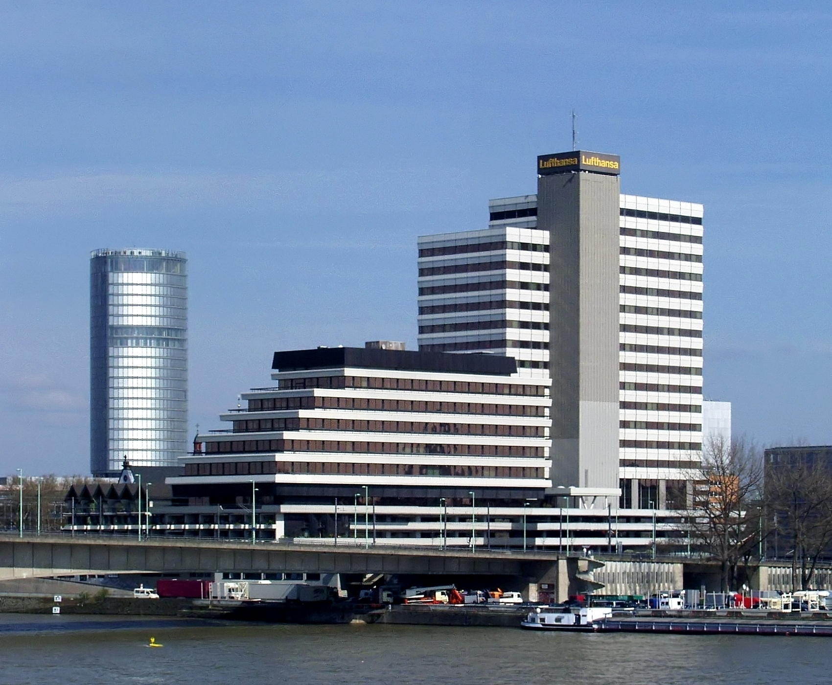 Zentrale der Lufthansa in Köln bis 2008. Die Gebäude werden seit Sommer 2010 kernsaniert und werden nach Fertigstellung „maxCologne“ heißen.